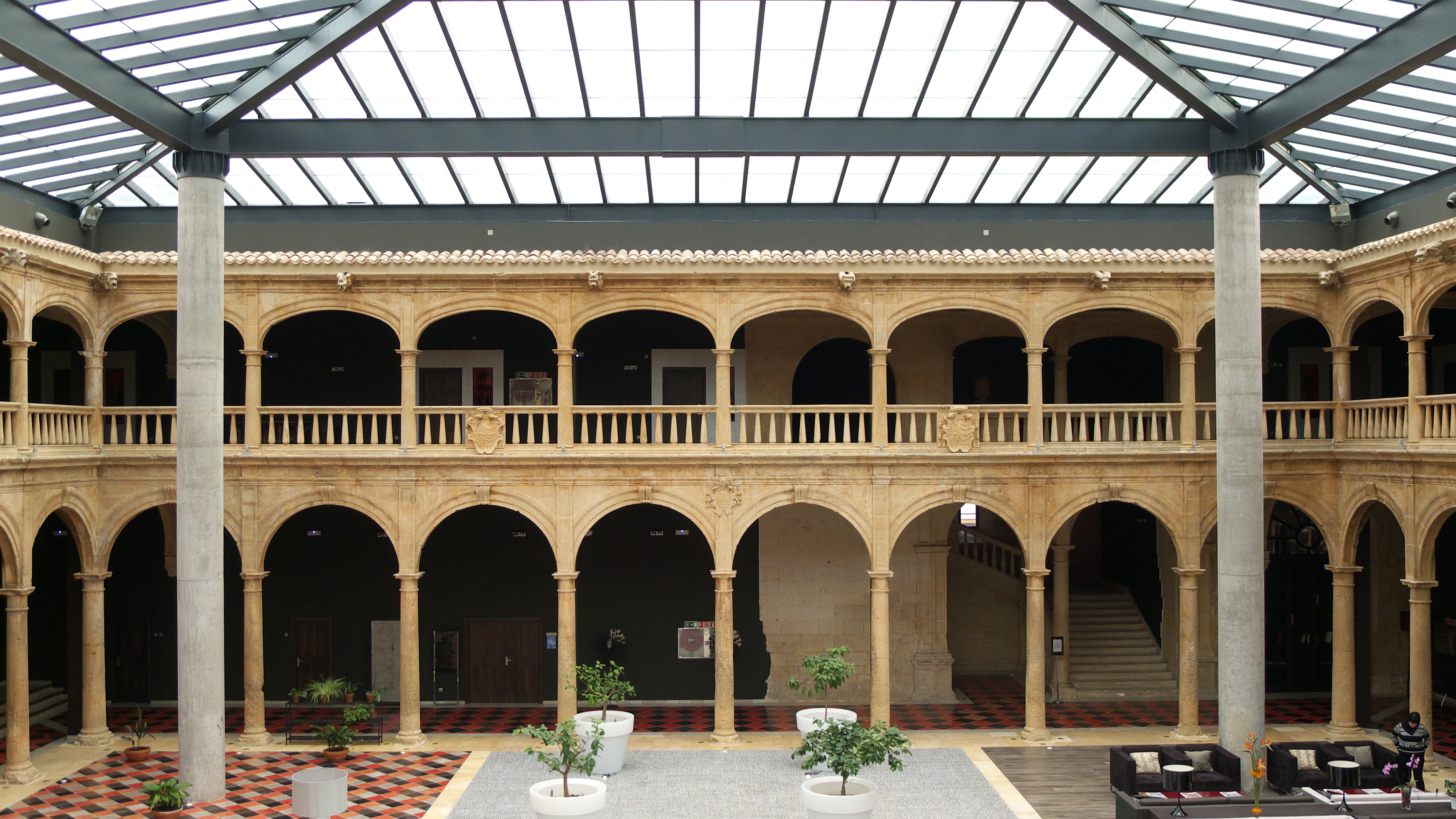 Grandioso patio renacentista de conseguida armonía entre los arcos de medio punto y los carpaneles. Desconozco el arquitecto que lo proyectó. Luis Bernasconi trabajó en la Capilla de Palafox y sacristía de la Catedral, interviniendo en este patio en el 1779.